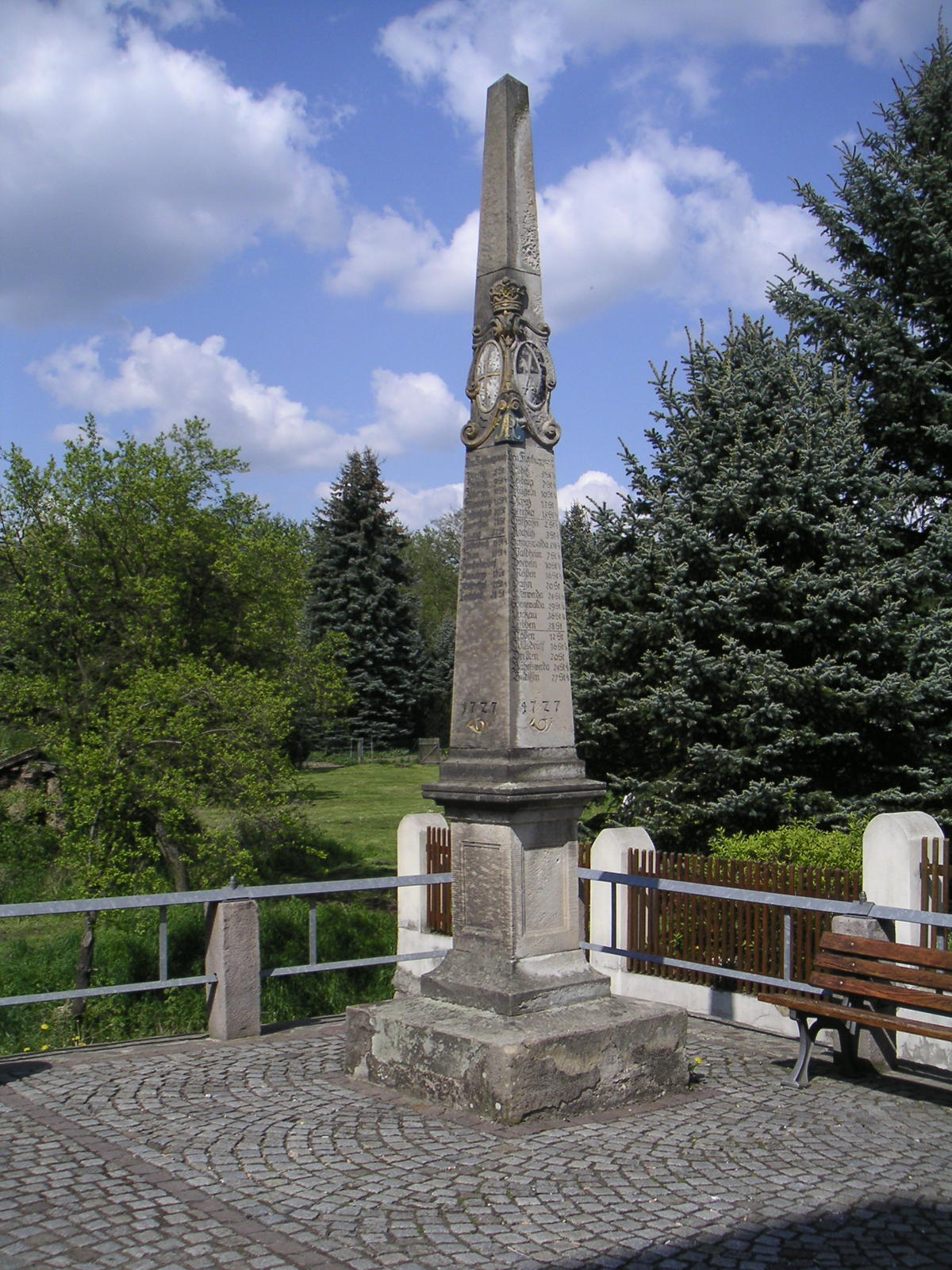 Kursächsische Postmeilensäule von 1727 in Frohburg, Ecke Bahnhofstr./August-Bebel-Str.